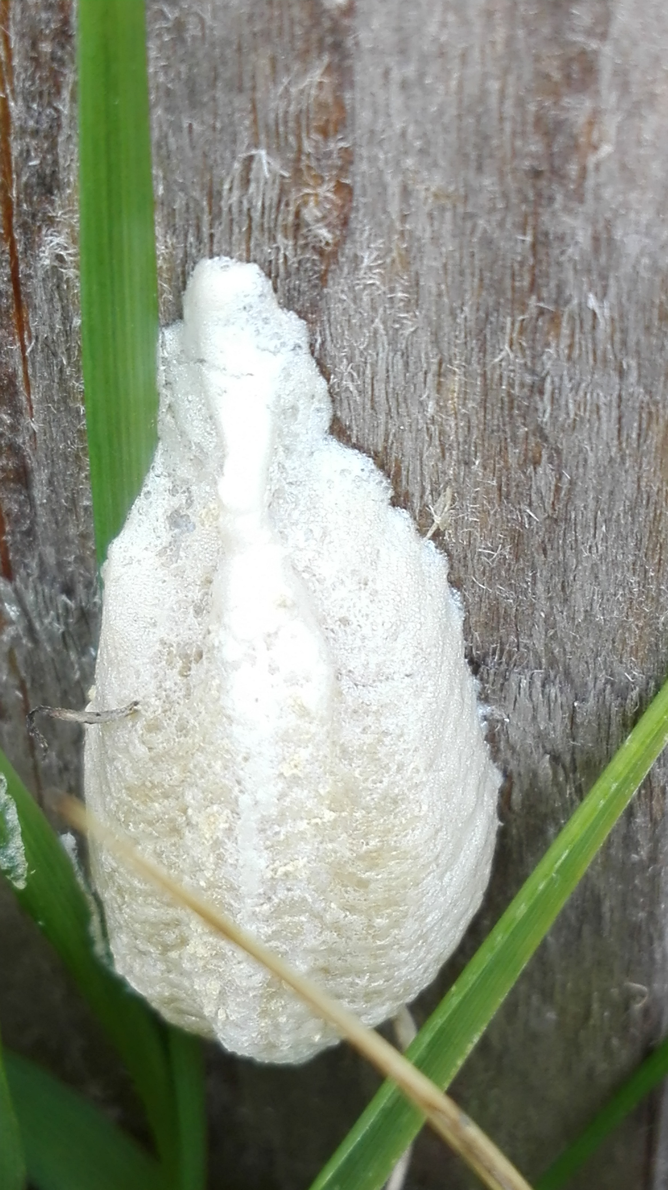 Mantis religios (Imádkozó sáska petéit védő burok, elölről)